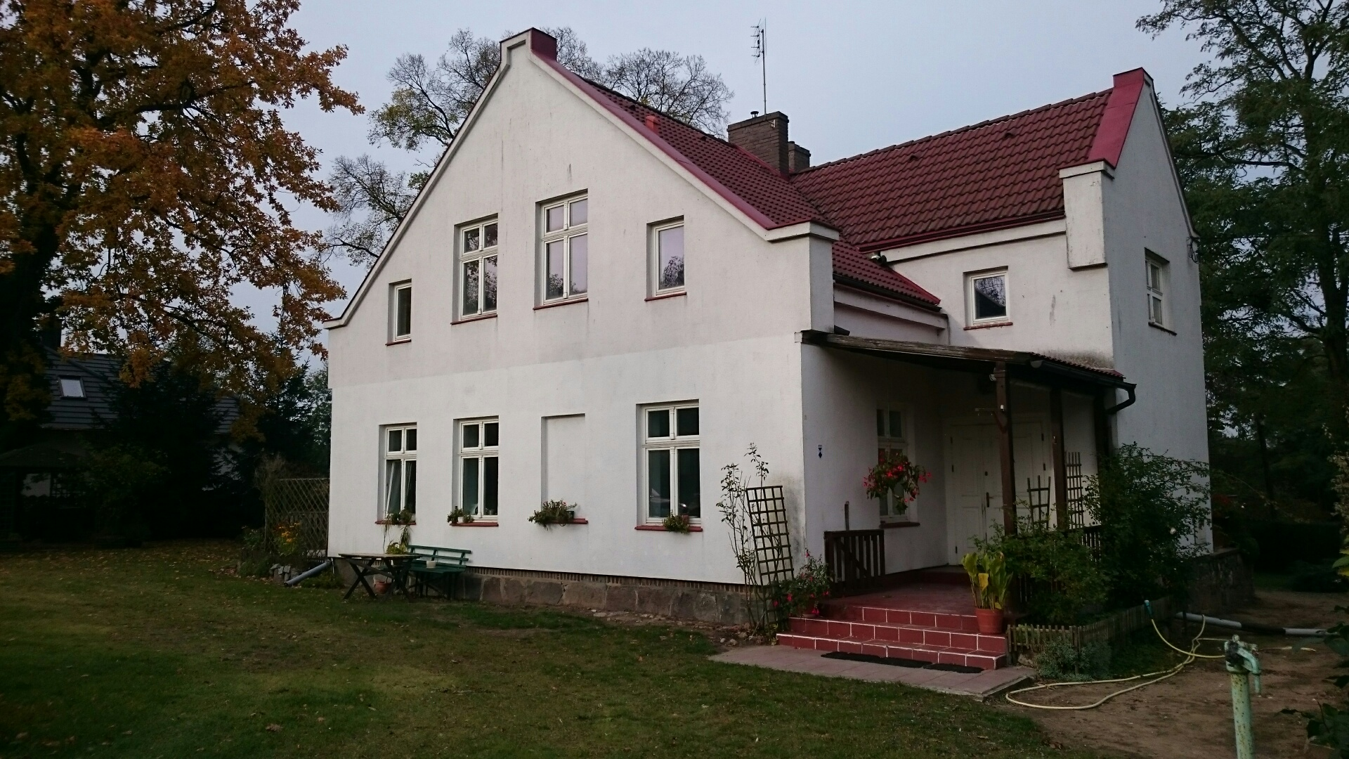 Dwór Chudzińskich w Jerzynie, stan obecny (10.2016)